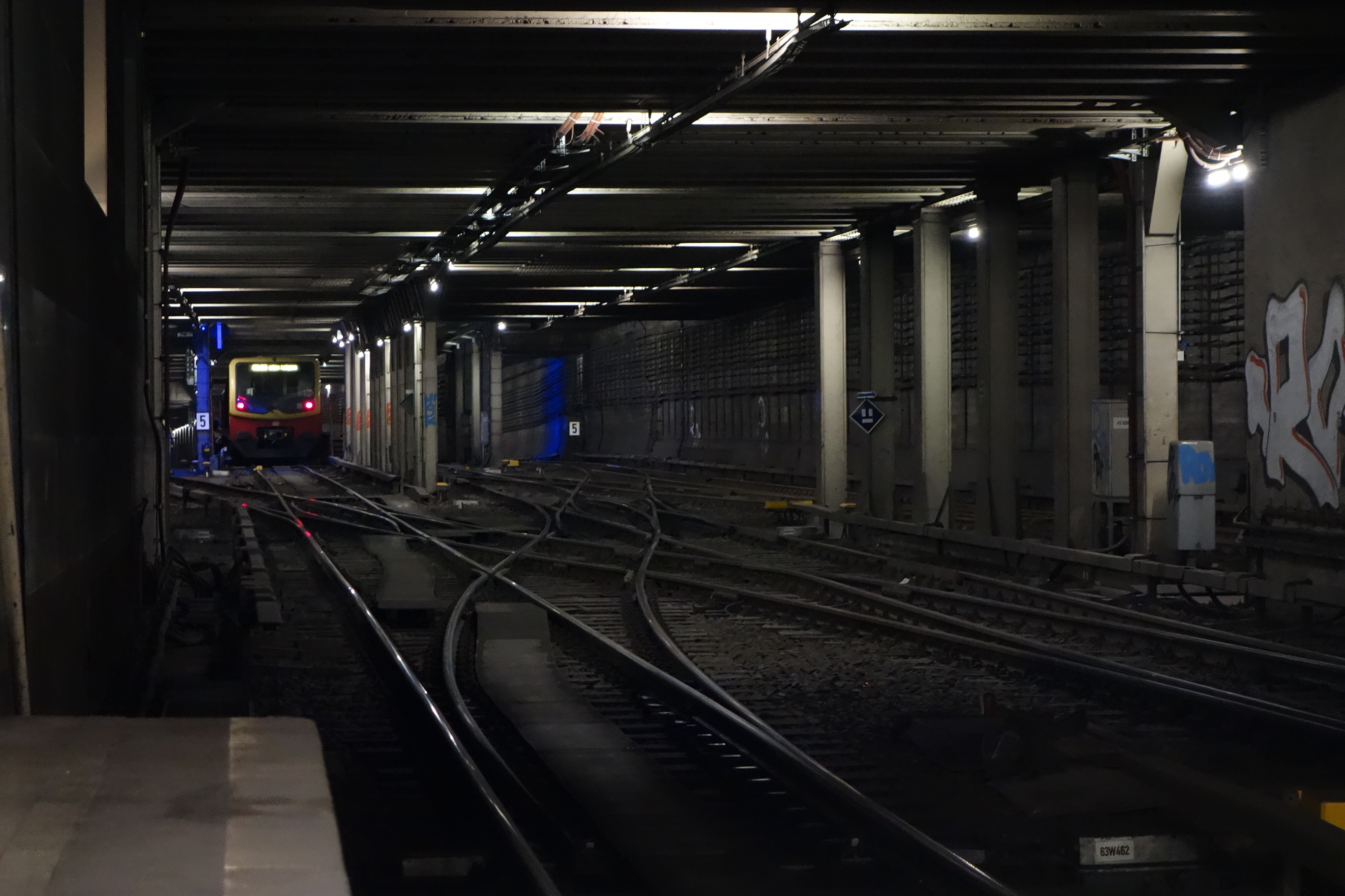 Berlin S-Bahnhof Potsdamer Platz, nördlich gelegene Kehranlage ("Heuboden") und geplante Einbindung S21